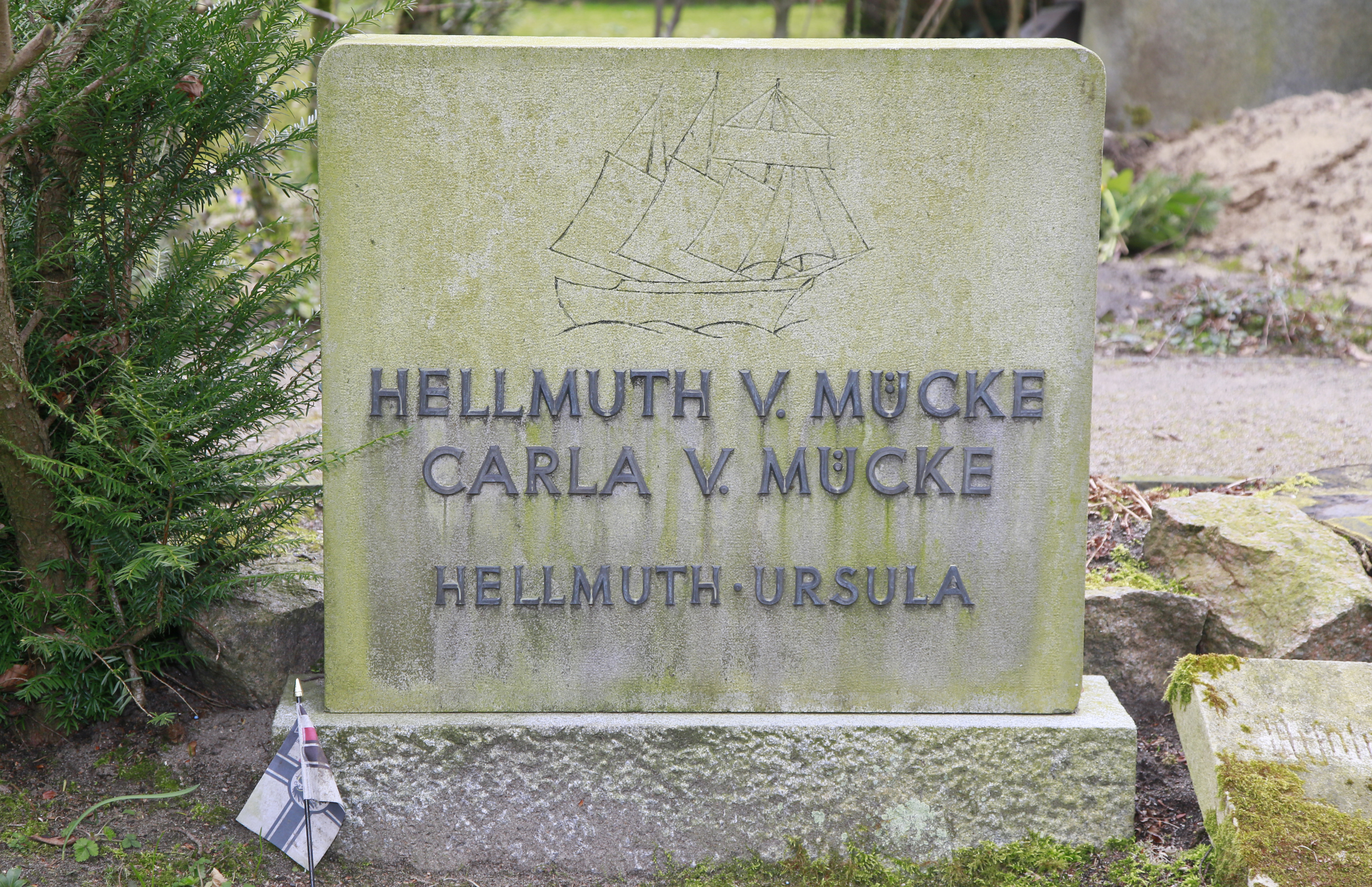 Hellmuth von Mücke (* 25. Juni 1881 in Zwickau; † 30. Juli 1957 in Ahrensburg) war Offizier der Kaiserlichen Marine und wurde bekannt als Führer einer kleinen Gruppe deutscher Matrosen, die sich während des Ersten Weltkrieges vom Indischen Ozean nach Deutschland durchschlug. Während der Zeit der Weimarer Republik betätigte er sich als Politiker und Schriftsteller. Nachdem er wegen seiner publizistischen Tätigkeiten während der Zeit des Nationalsozialismus verfemt wurde, setzte er sich in der jungen Bundesrepublik vehement gegen die Wiederbewaffnung ein.